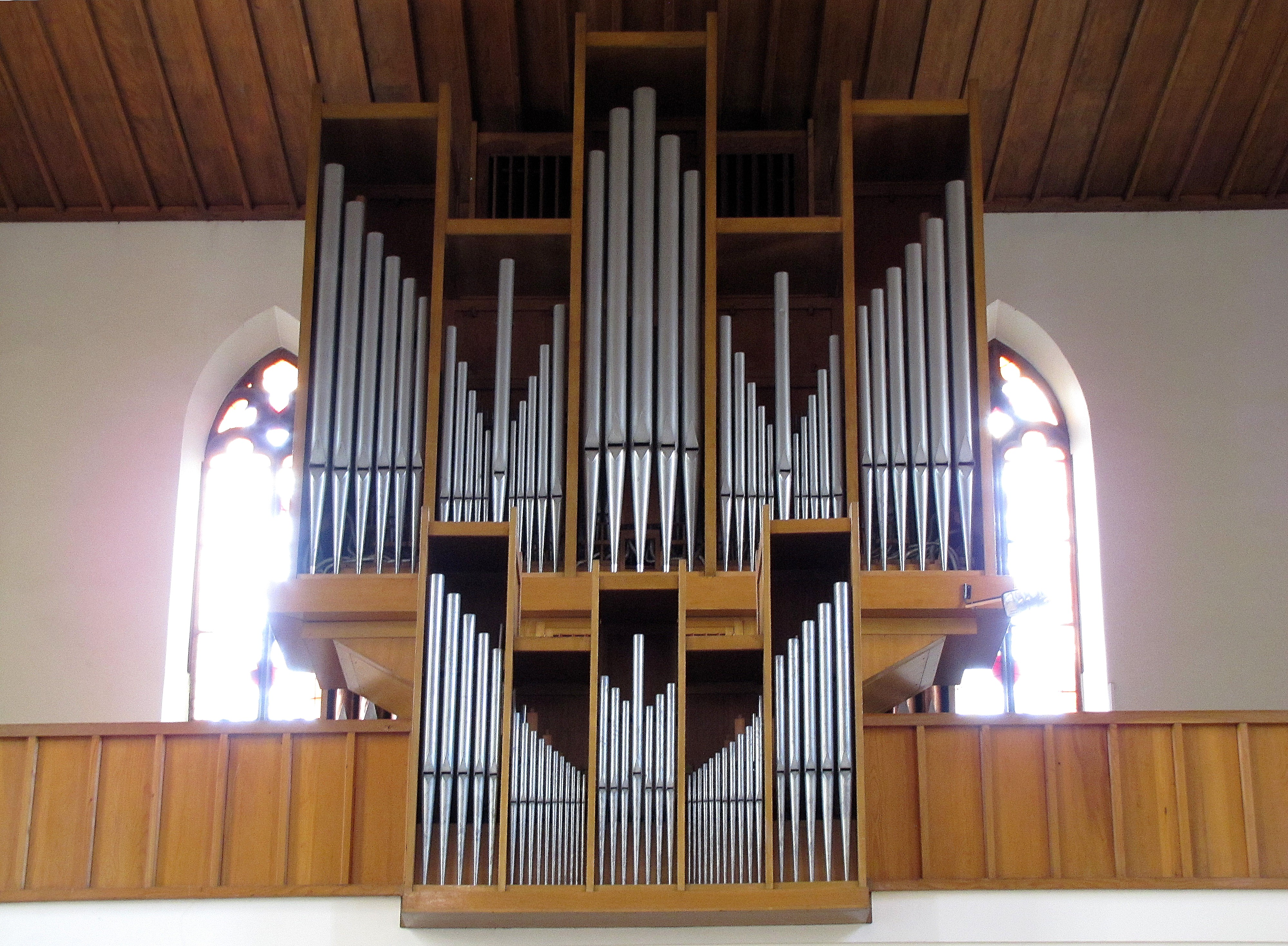 Alsace, Bas-Rhin, Église Saint-Jean de Strasbourg (PA00085027).Orgue de tribune Schwenkedel (1967).